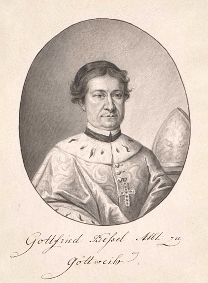 Gottfried Bessel (1672-1749), Benediktiner, Abt von Göttweig, stammte aus Buchen im Odenwald